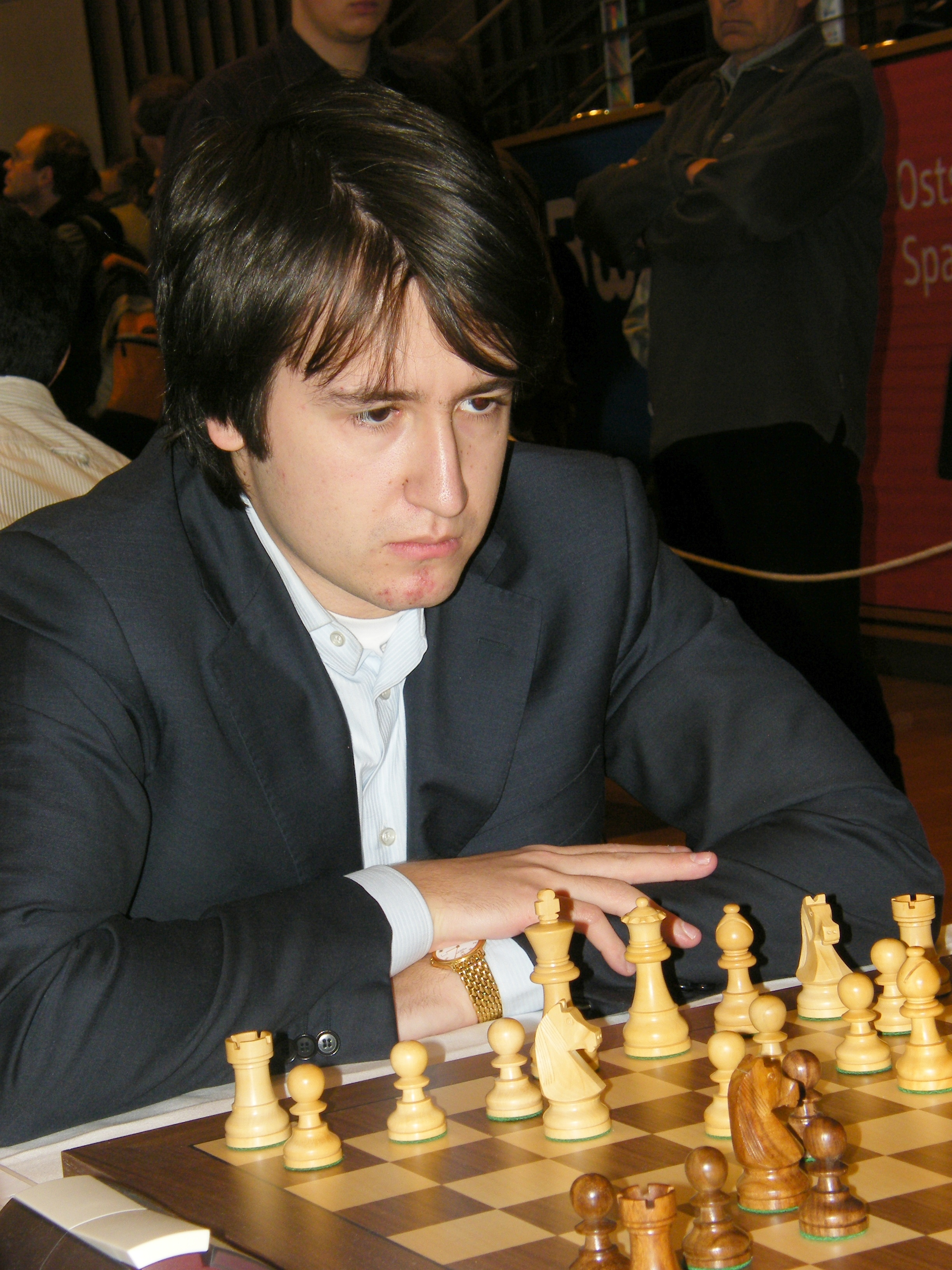 Teimur Radjabow bei der 38. Schacholympiade in Dresden 2008